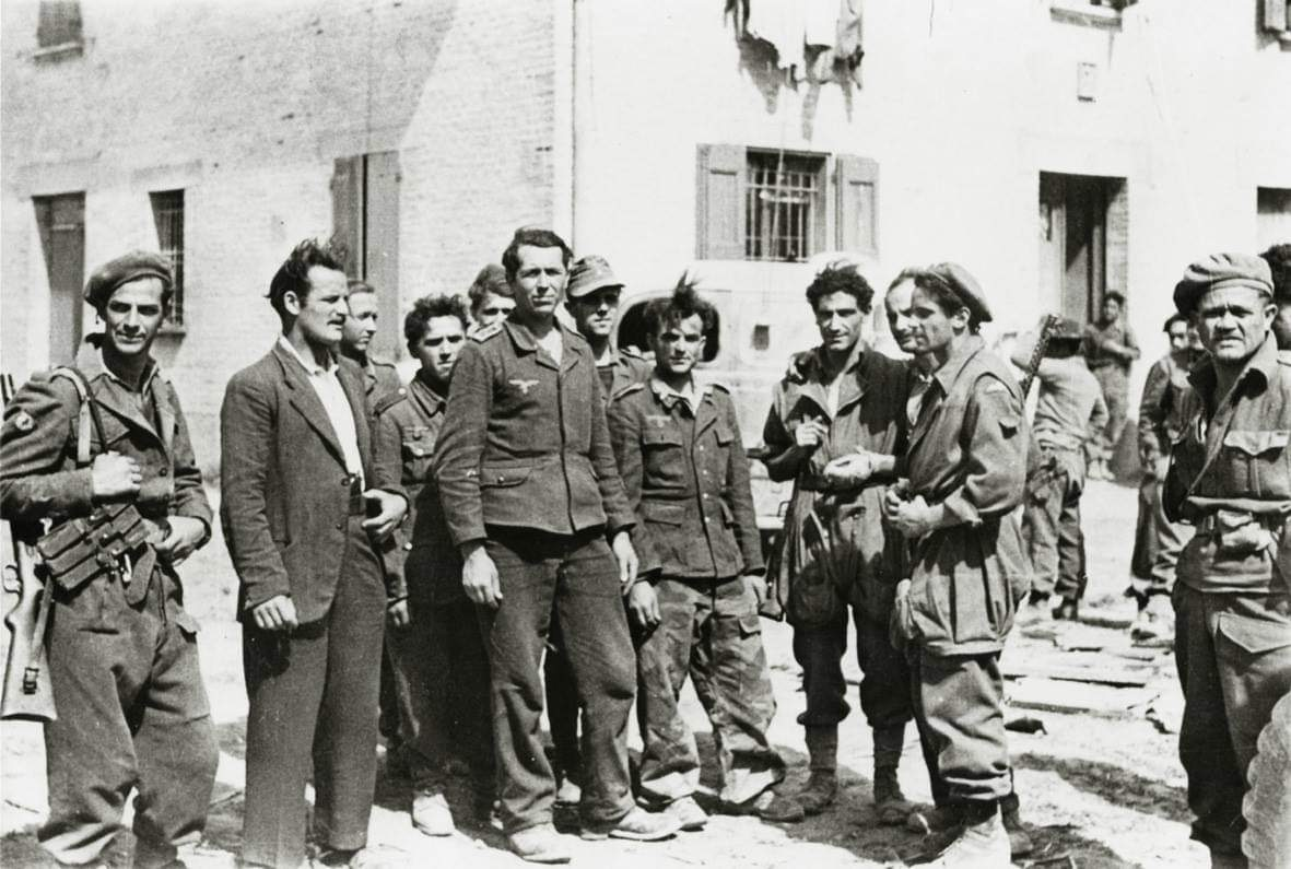 Prigionieri nazisti catturati dai paracadutisti italiani dell'operazione Herring (Mirandola, aprile 1945)